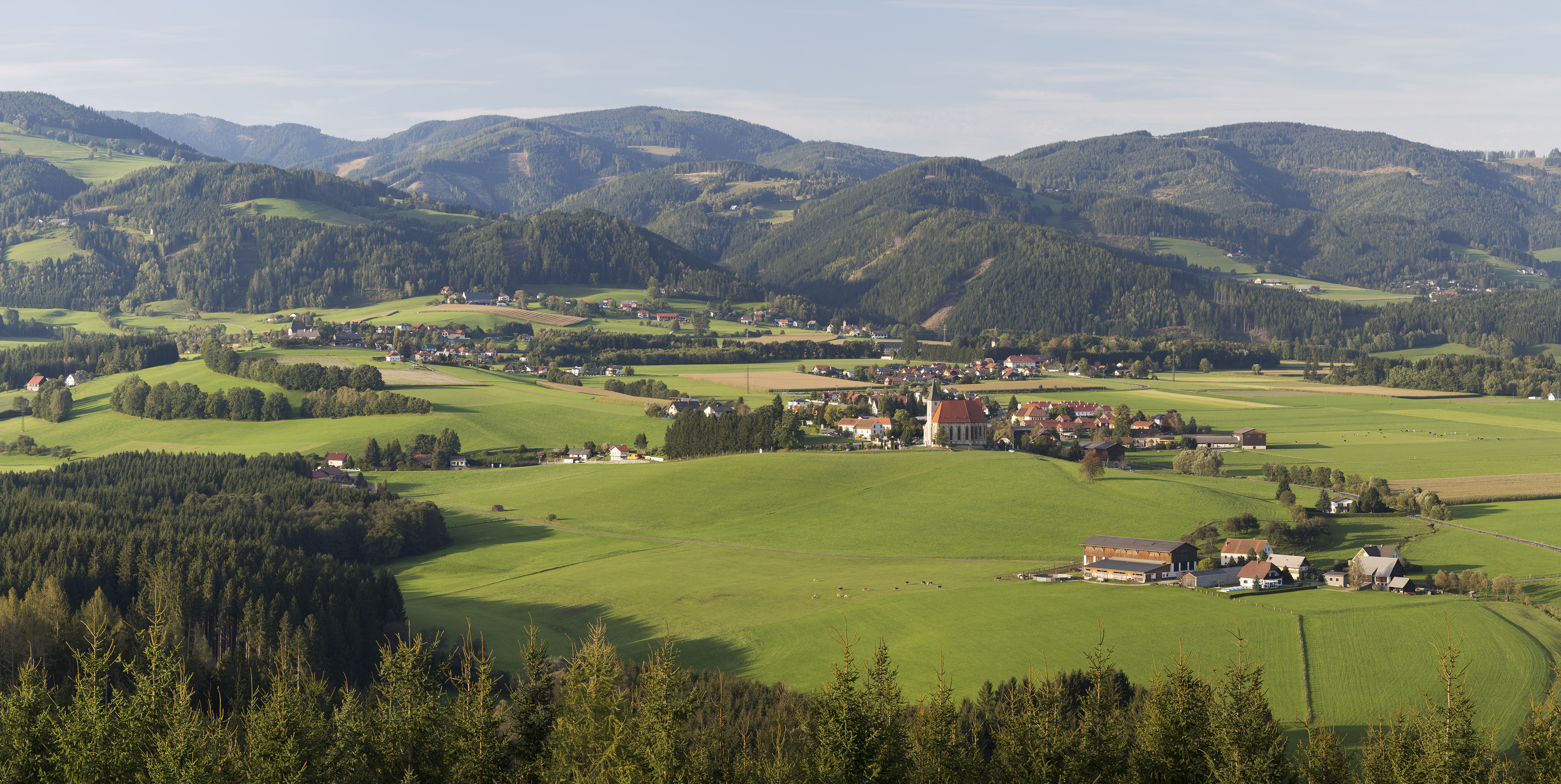 Die Orte Sankt Marein bei Knittelfeld und Sankt Martha von Süden, aufgenommen vom Zuckenhut.